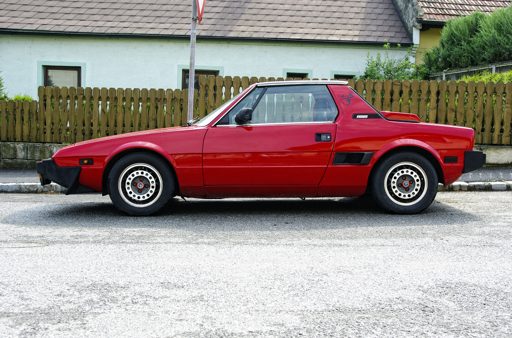 Fiat X1/9